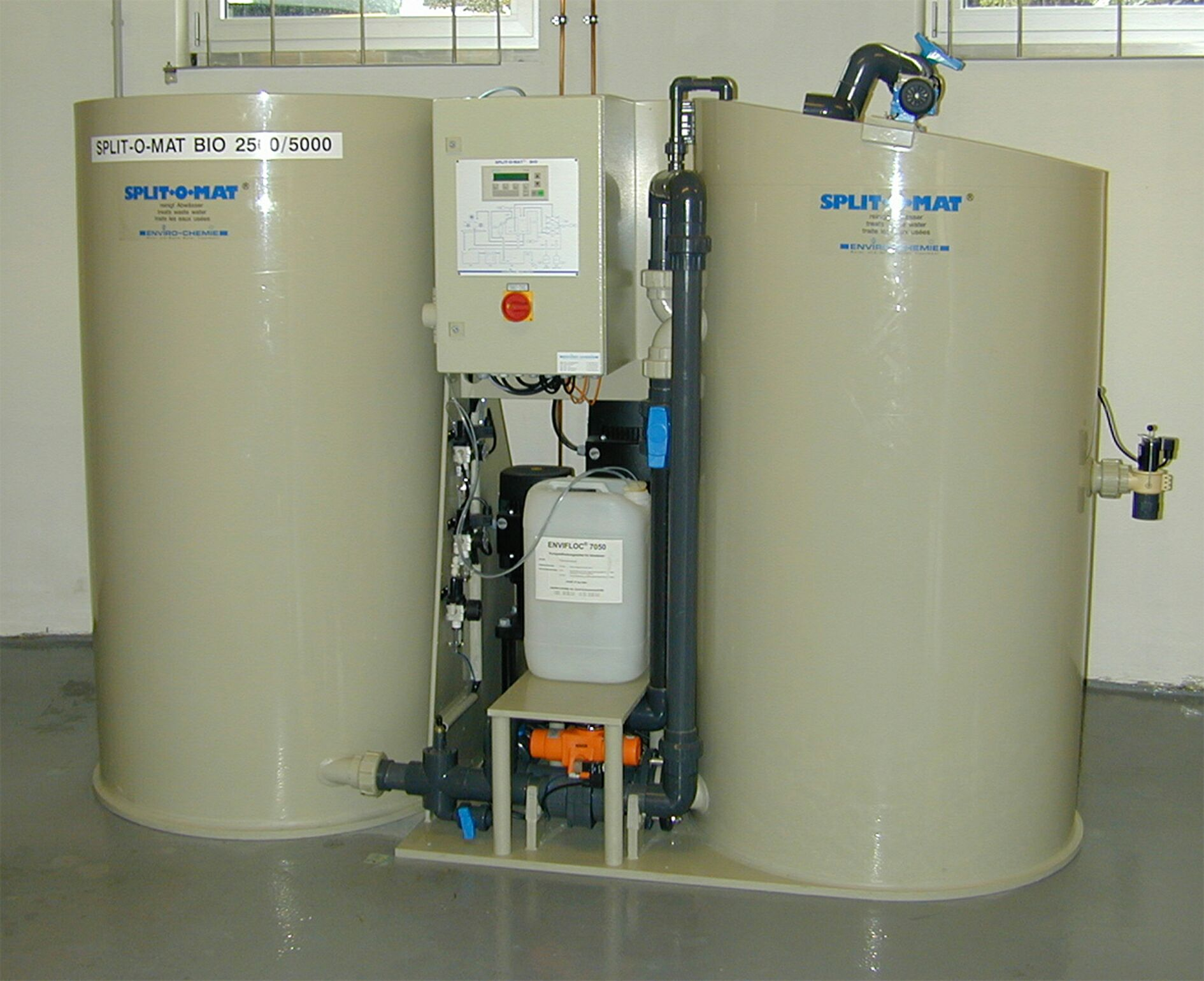 фото SPLIT_O_MAT_BIO